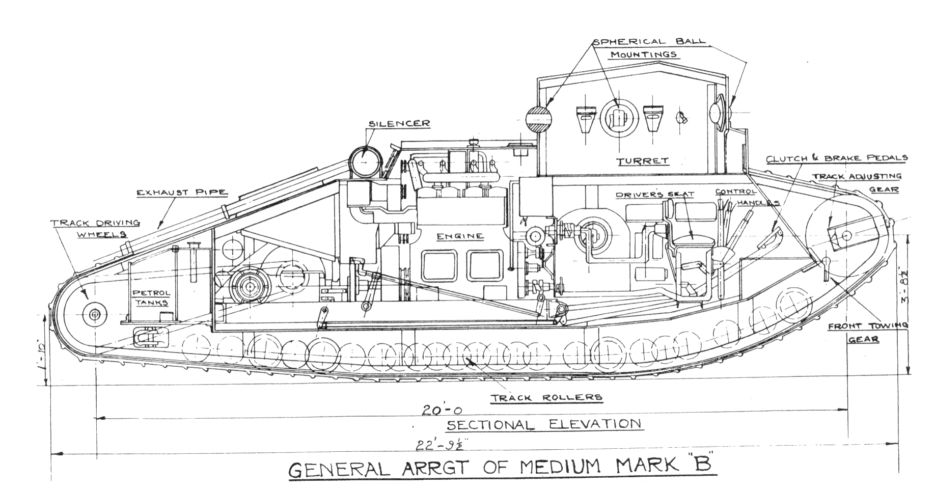 Digitale reproductie foto van de bouwvoorsteltekening van de Medium Mark B tank.